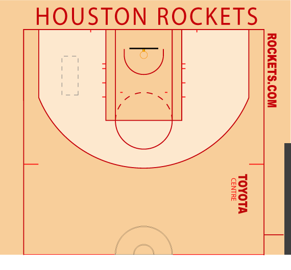 ロケッツホームコート配色